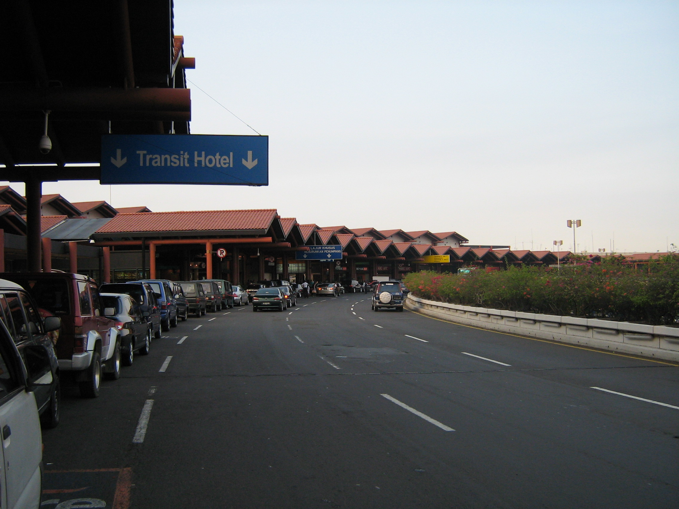 jakarta airport T2